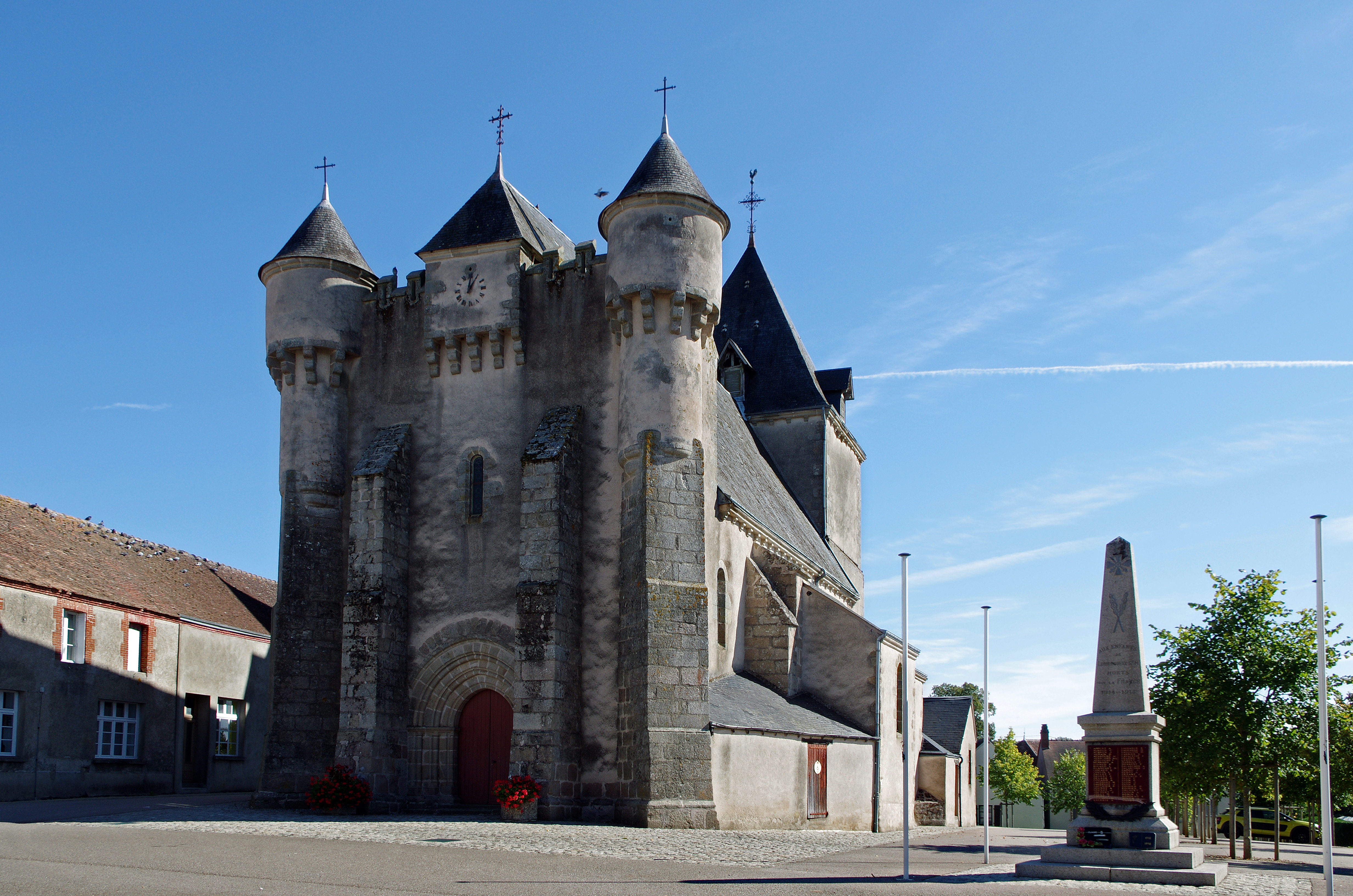 Lourdoueix-Saint-Michel (Indre) Église fortifiée (XIe-XIIIe-XVe). La porte d’entrée, entre deux contreforts du pignon, a été restaurée au XVe siècle. Les contreforts placés aux angles de l’édifice sont attribués eux aussi au XVe siècle. Ces contreforts servent de support à 2 poivrières. Un un chemin de ronde relie les 2 poivrières en passant par une bretêche située au dessus de la porte. . Une rangée de mâchicoulis permettaient de protéger la façade de l’église. Placée dans l’axe de l’église, la bretèche est munie de mâchicoulis qui surplombent la porte d’entrée. Le plus ancien texte mentionnant l'édifice date de 1154. De cette époque subsiste un cordon en dent de scie encastré dans le mur de l'abside actuelle. L'édifice a été reconstruit en 1445, sous les ordres de l'évèque Pierre de Montbrun de Limoges Deux chapelles ont été ajoutées de chaque côté de l'église au XVe et au XVIe.